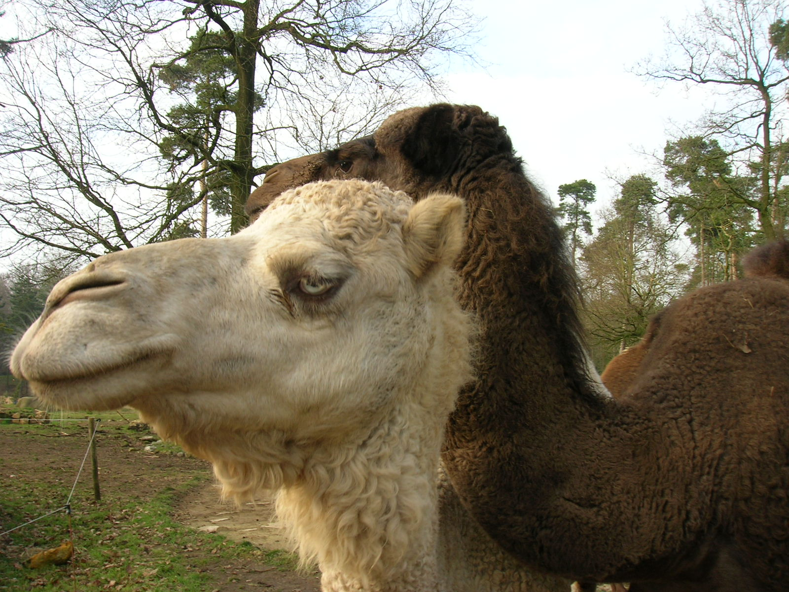 Dromedaris, Bijbels Openluchtmuseum